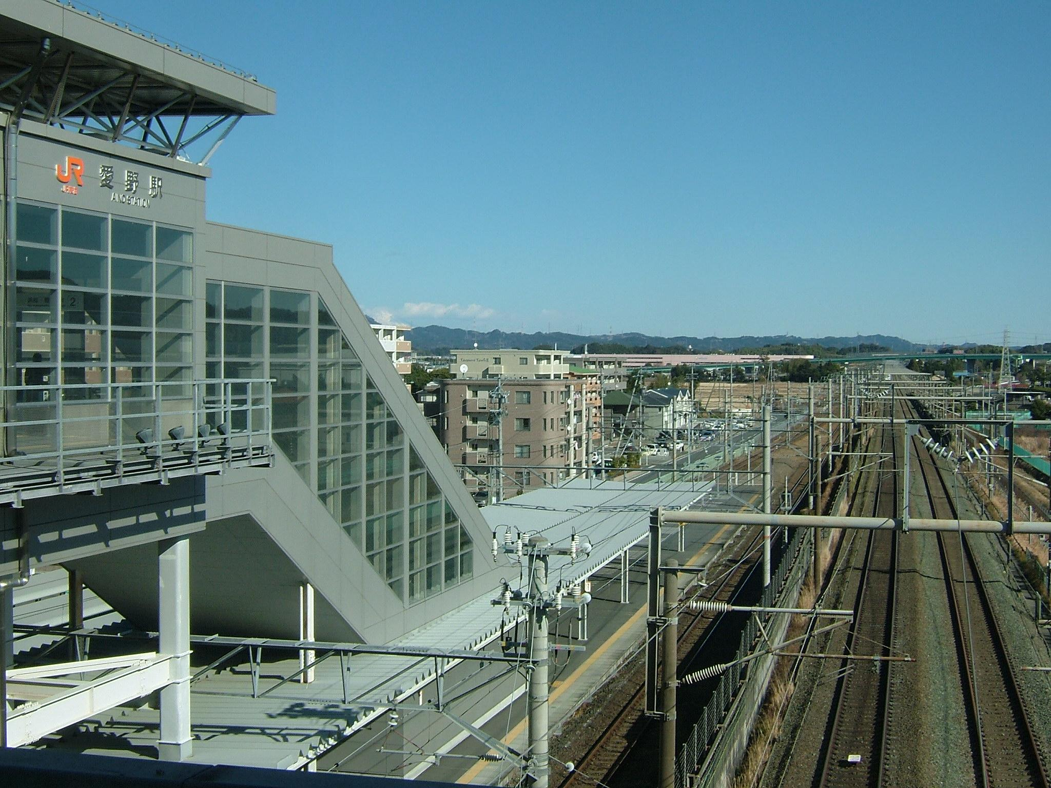 東海道本線愛野駅と東海道新幹線